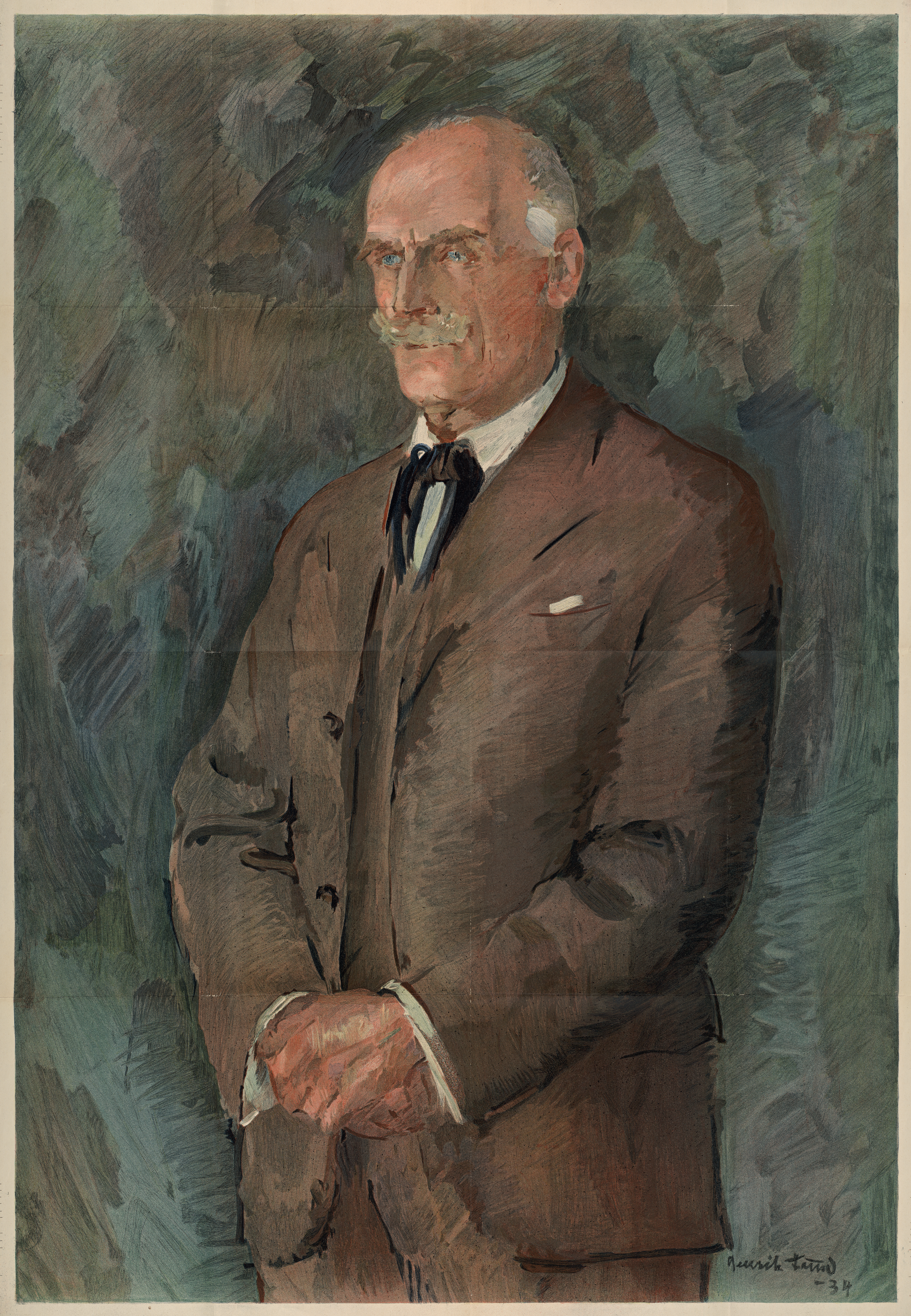 Plakat / Poster